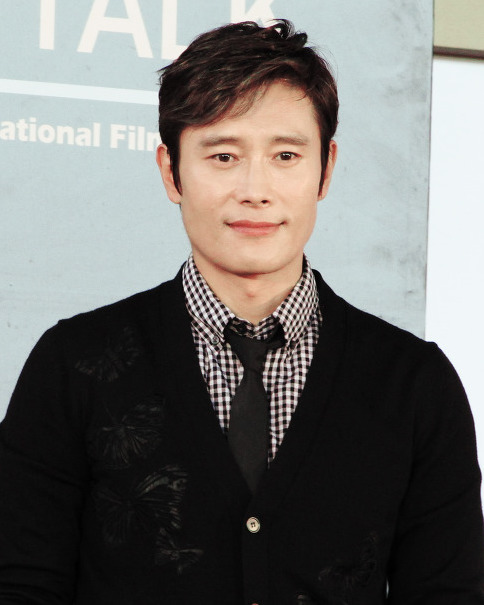 161007 부산국제영화제 오픈토크.